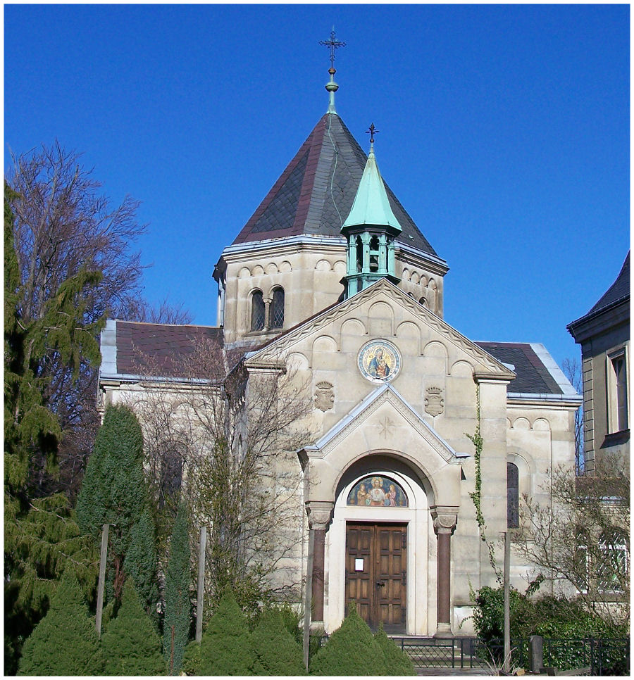 Gaußig, SchlosskapelleHornjoserbsce: Hrodowska kapałka w Husce